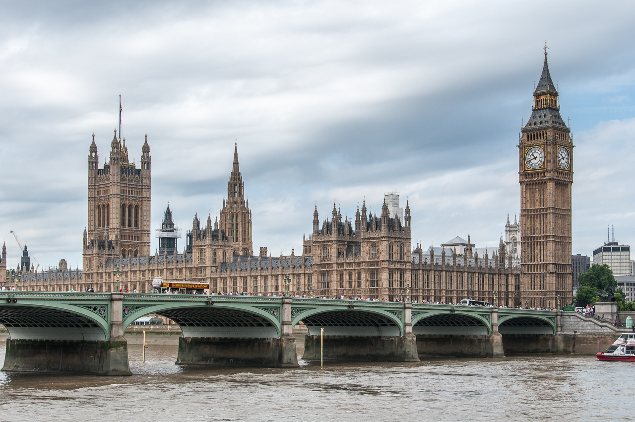 Una vista del parlamento de Londres y el puente de Westminster